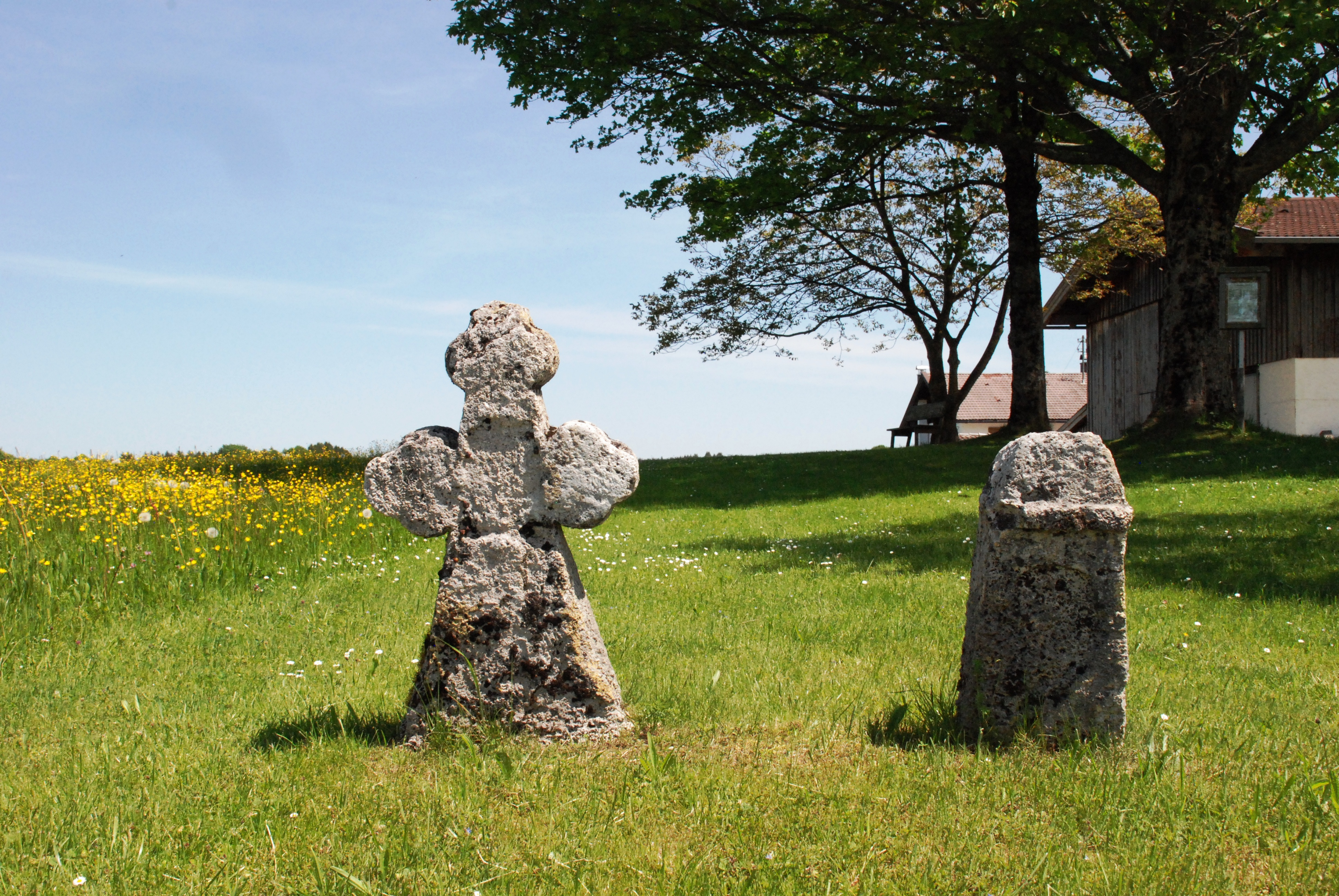 "Timotheuskreuz" am Weiler Feldschuster, Ortsteil Einhaus, Gemeinde Warngau, Landkreis Miesbach, Regierungsbezirk Oberbayern, Bayern. Errichtet zum Gedenken an den Tod von Timotheus Apian, Bruder des Kartographen Philipp Apian, an dieser Stelle am 10. September 1562.